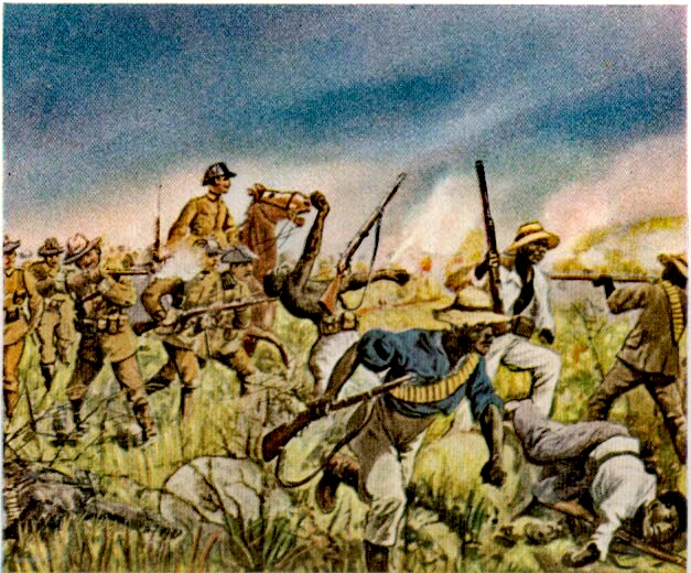 German troops fight the Herero, circa 1904. Painting by Richard Knötel (1857-1914), published in a 1936 book.